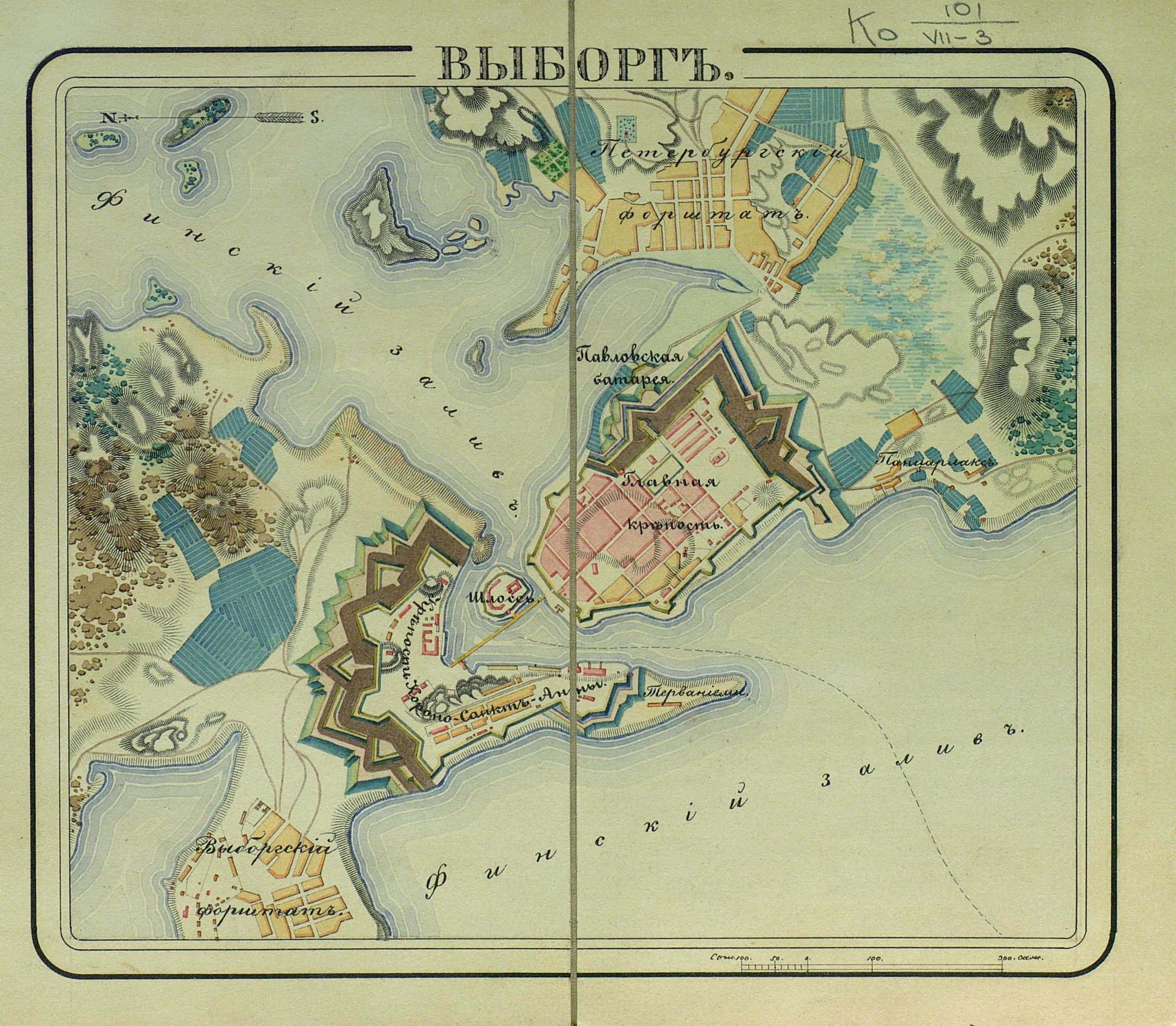 Выборг.